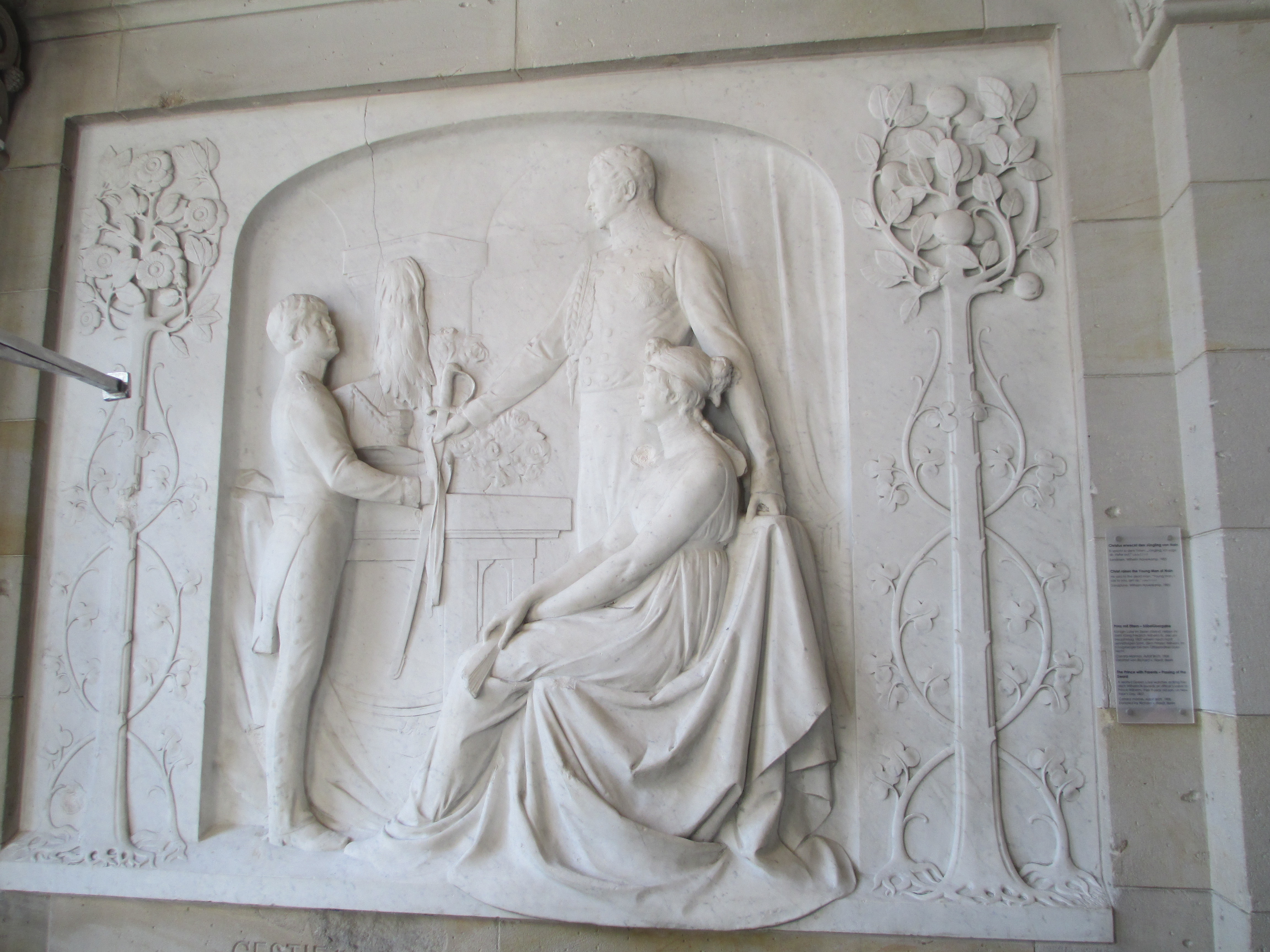 תבליט של הנסיך וילהלם מקבל חרב מאביו